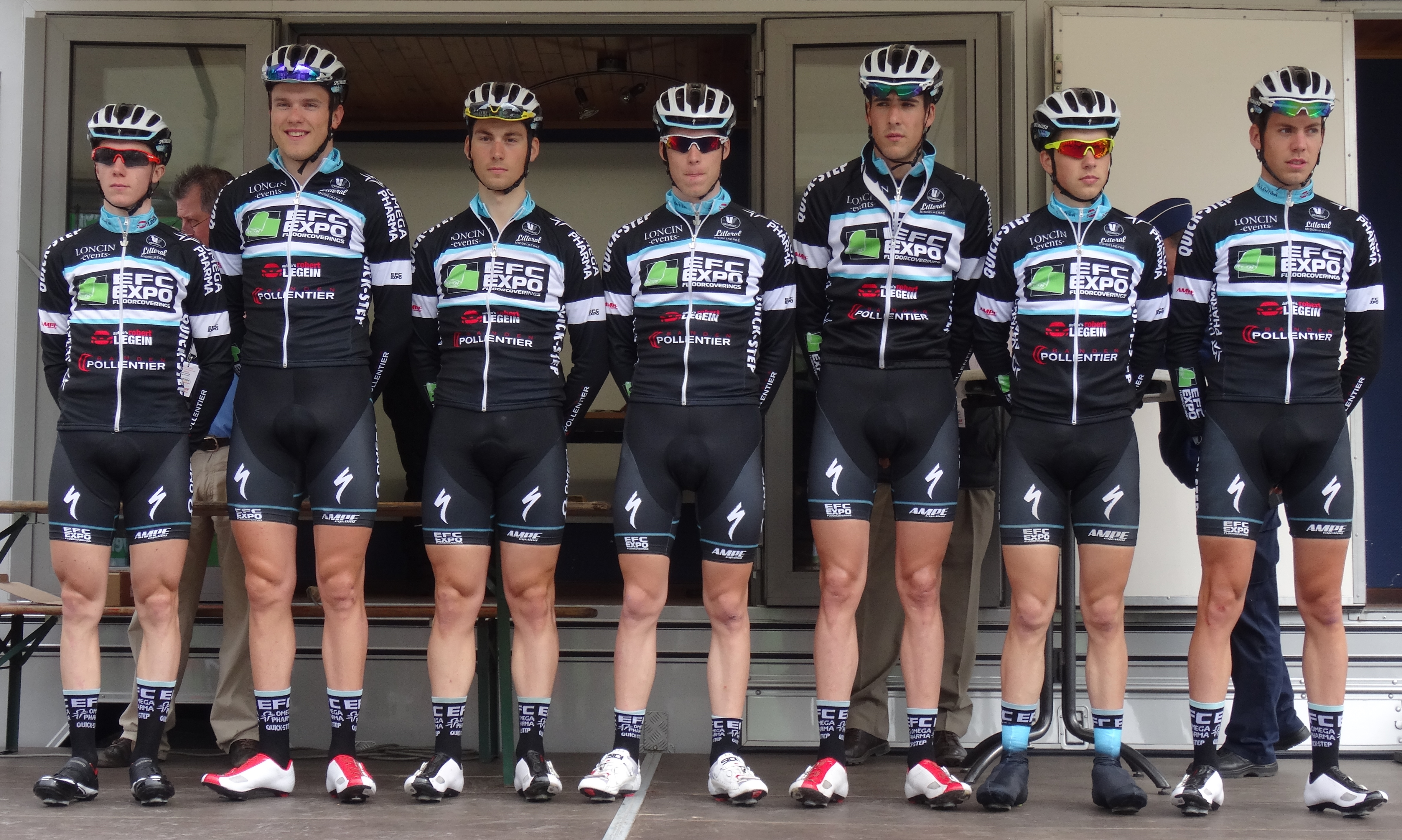 Triptyque des Monts et Châteaux 2014, étape 3, 6 avril 2014, départ de Belœil. Depicted team: EFC-Omega Pharma-Quick Step The creation of these files was made possible thanks to the organizers of the Triptyque des Monts et Châteaux 2014 English | français | +/−